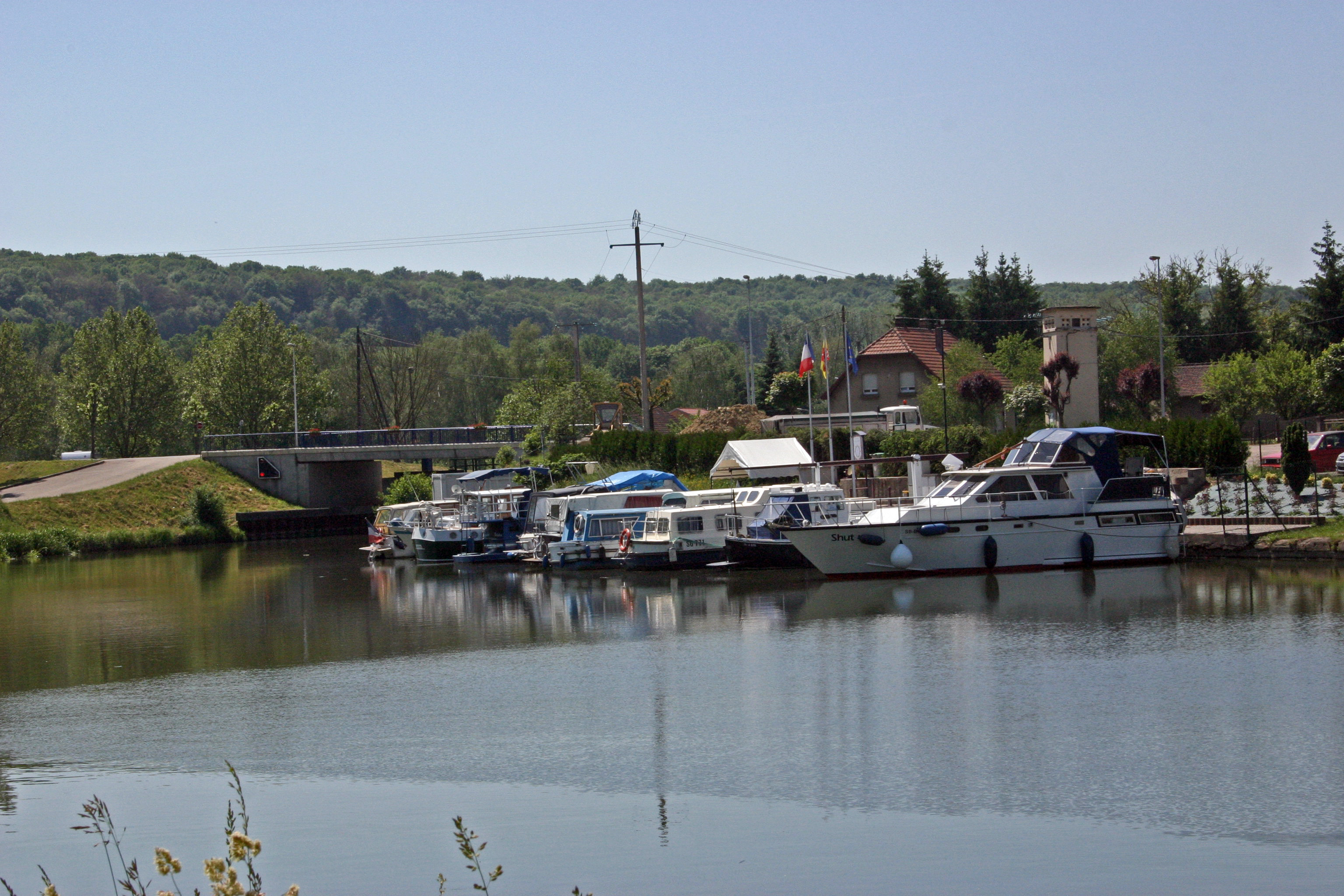 Wittring